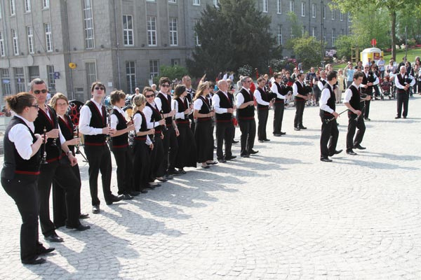 Bagad Gwengamp (de Guingamp) au Printemps des sonneurs rue de siam à Brest le 23 avril 2011.